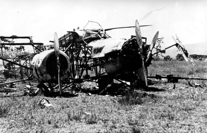 Resti dell'aereo Caproni Ca.133 della missione del generale Vincenzo Magliocco, morto nell'eccidio di Lechemti